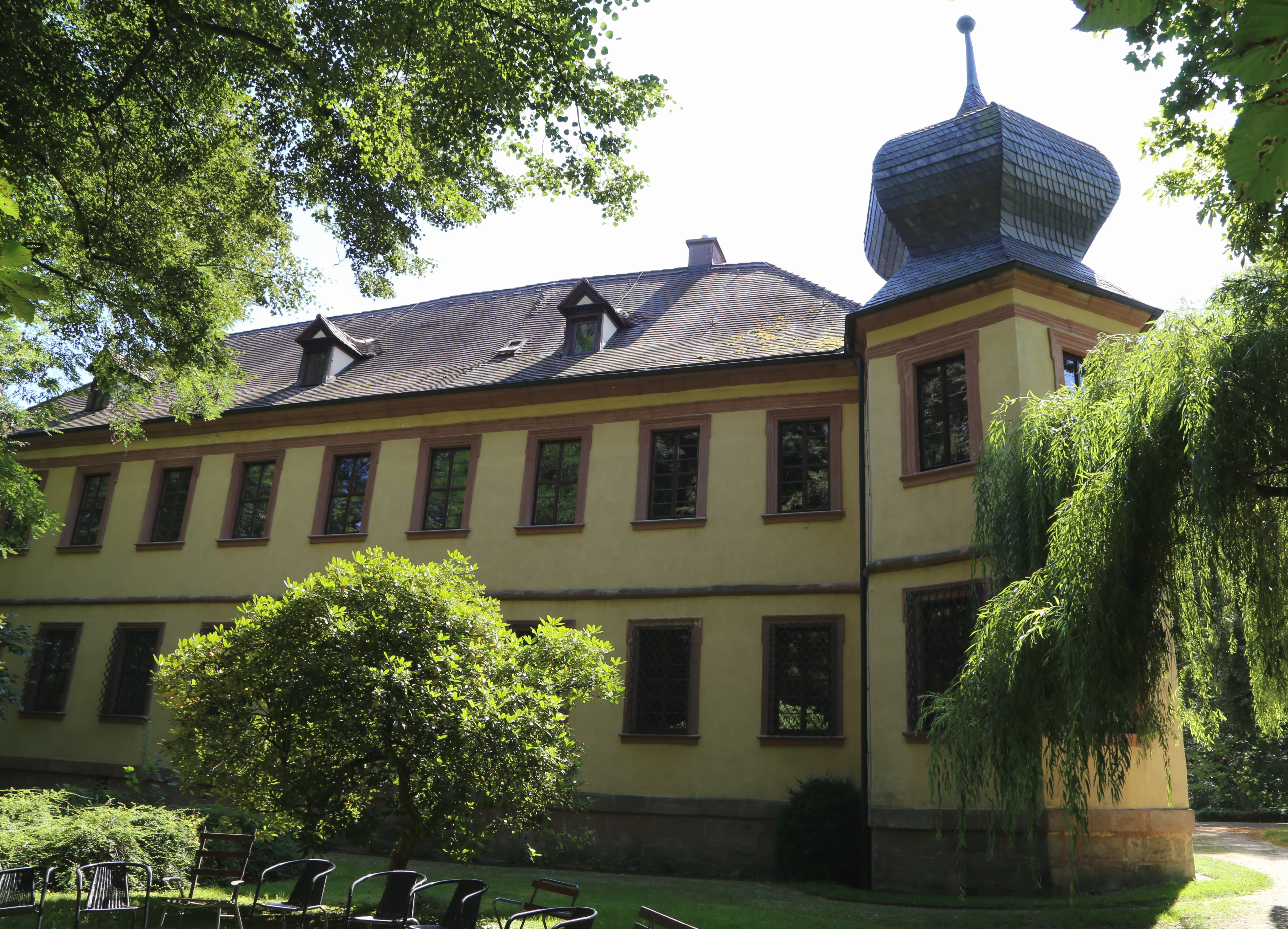 Höchstadter Straße 2; Schlossgartenstraße 11, Weisendorf; Schloss, Geviertanlage mit Ecktürmen, erbaut 1698 ff.; Ummauerung mit Einfahrt; Ökonomiegebäude, Verwalterhaus, Gartenhaus, 18. Jahrhundert; Park